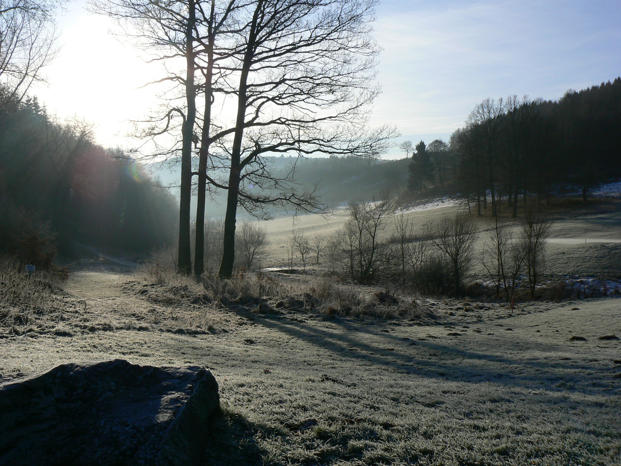 Reif am Morgen